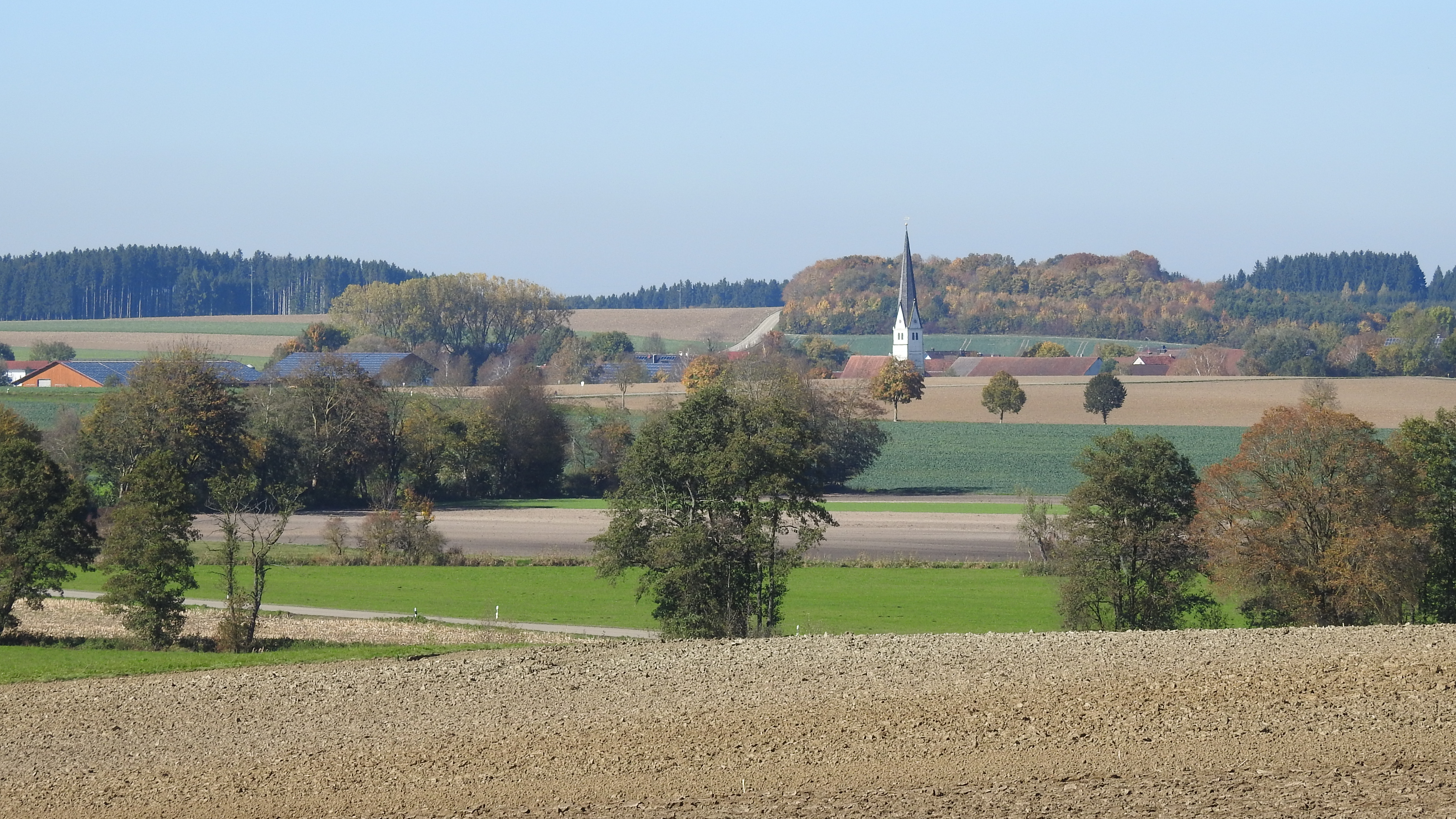 Luttenwang von Süden, Adelshofen